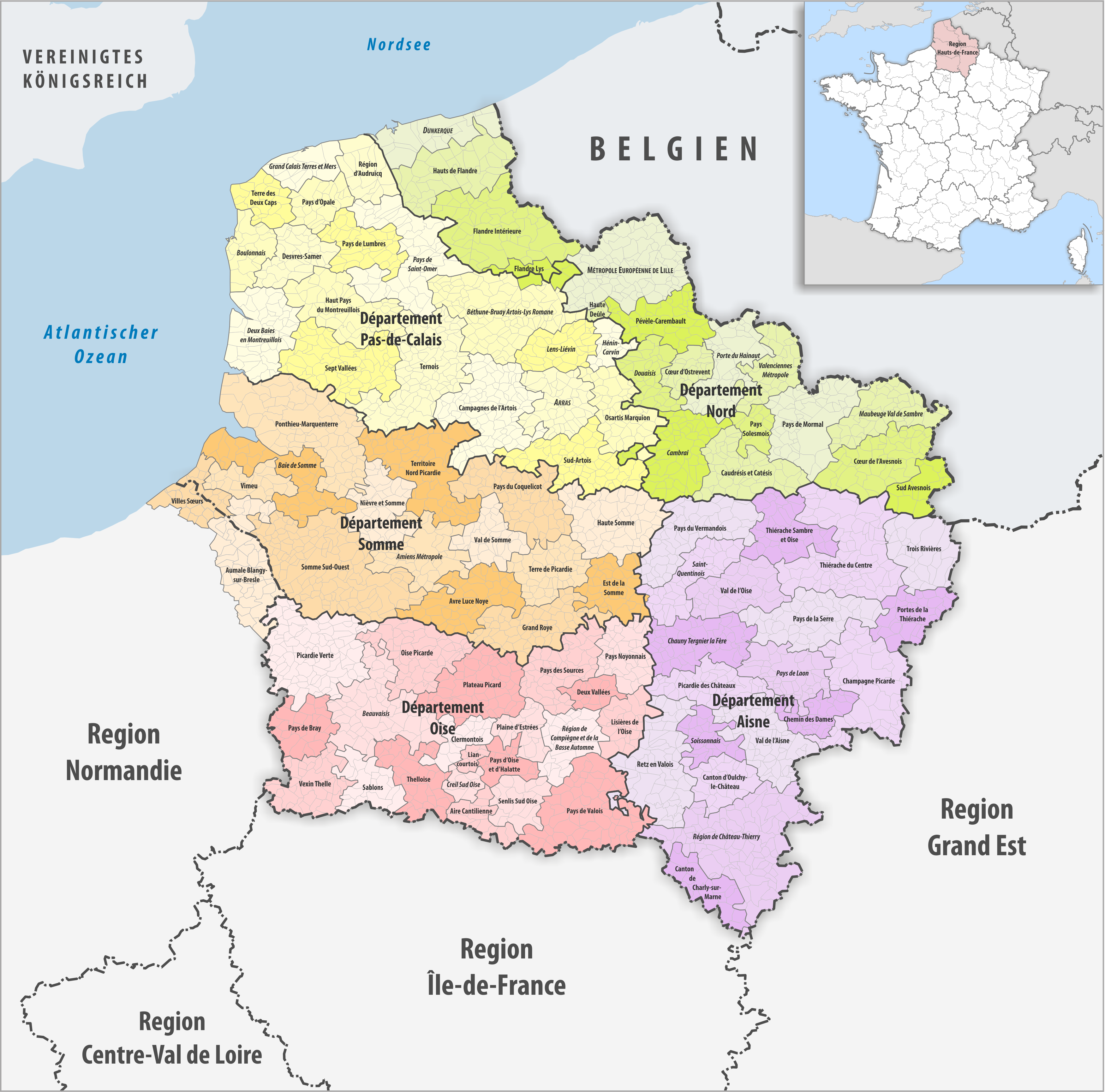 Gemeinden, Gemeindeverbände und Départemente in der Region Hauts-de-France